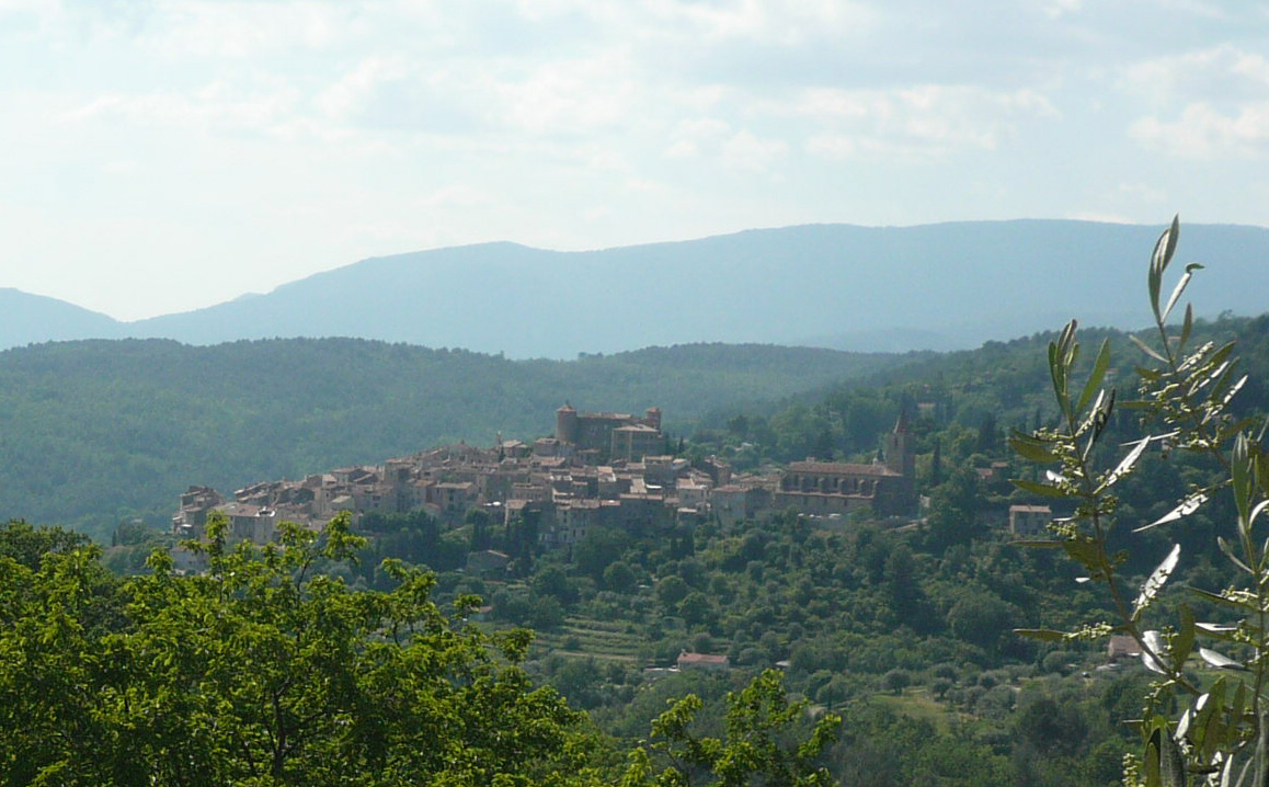 Callian